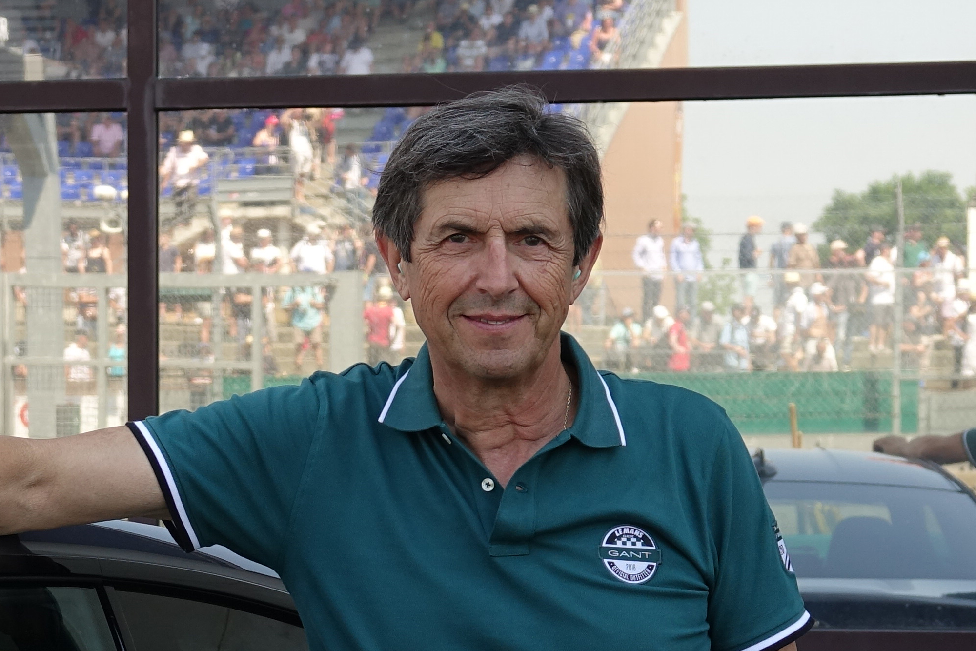 François Chatriot au Mans Classic 2018